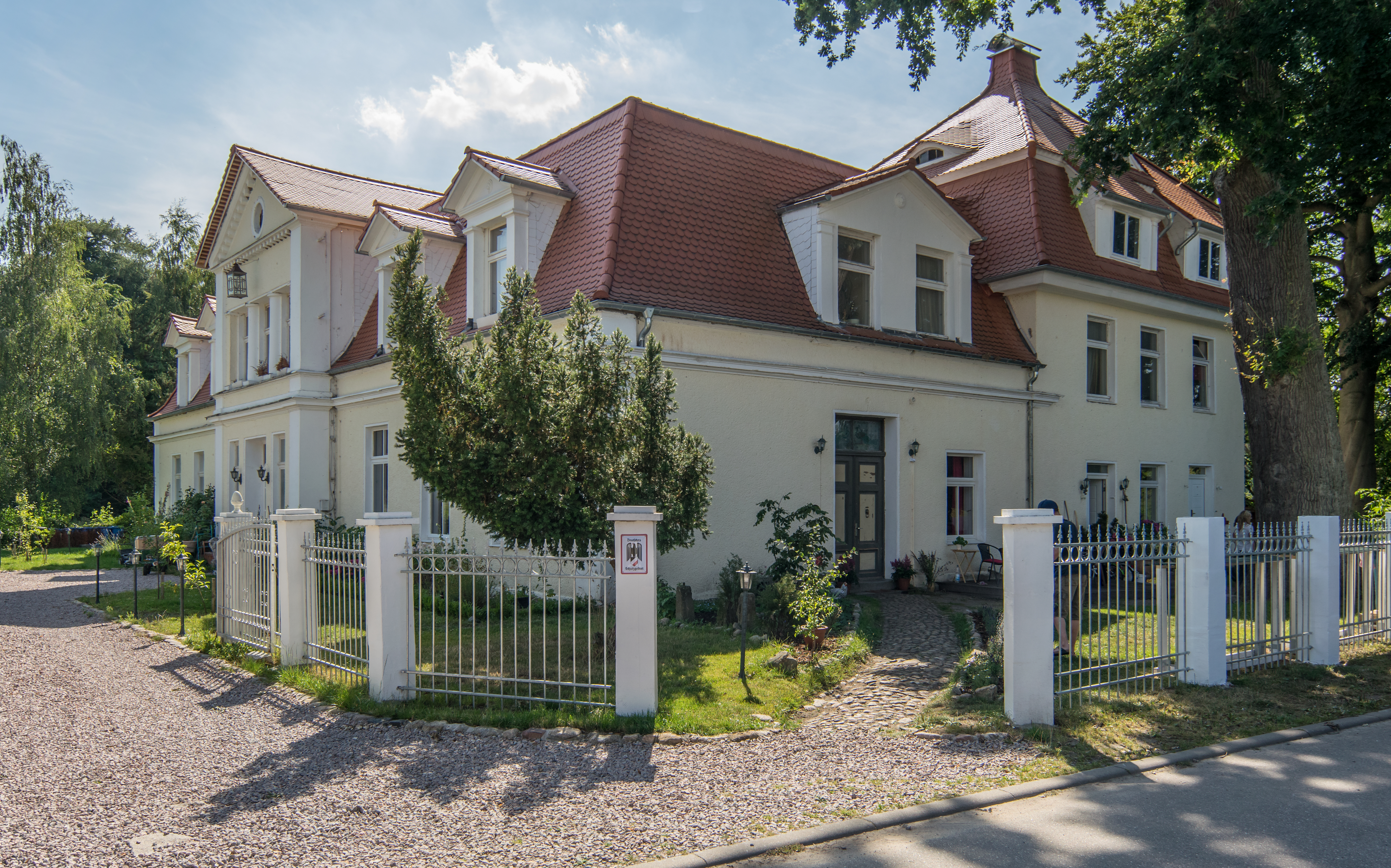 Gutshaus Scharstorf Detail